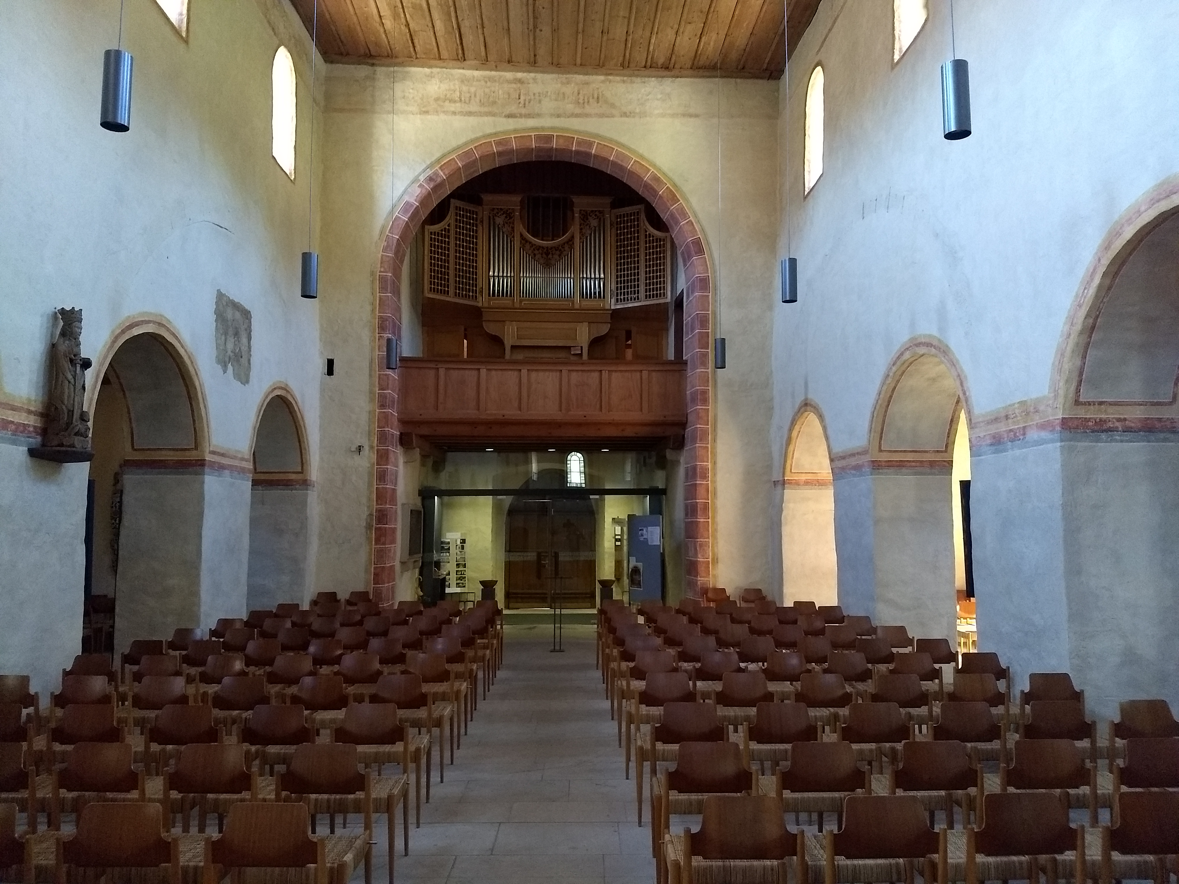 Die dem römischen Märtyrer St. Cyriak geweihte frühromanische evangelische Pfarrkirche St. Cyriak in Sulzburg zählt mit über 1000 Jahren zu den ältesten Kirchen Deutschlands. Sie war die Klosterkirche des Klosters Sulzburg.